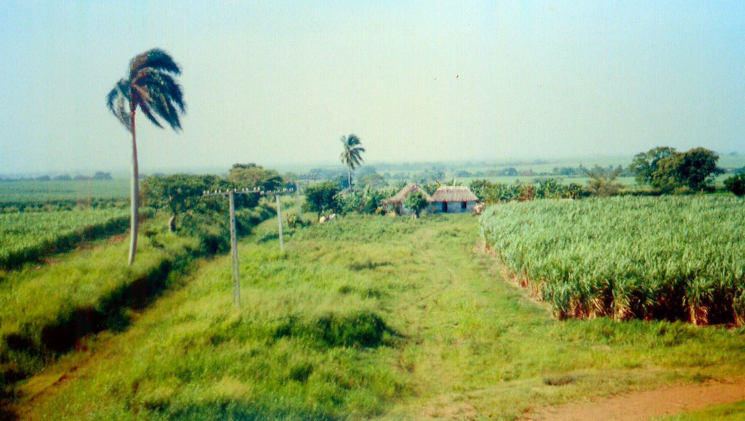 Sugarcane cultivation